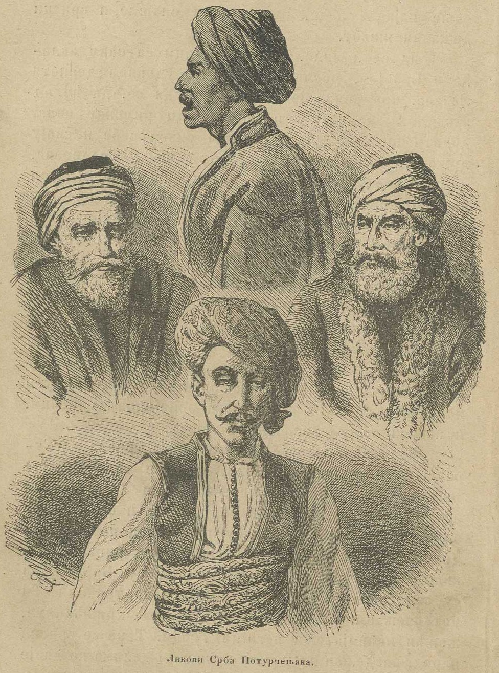 Likovi poturčenjaka